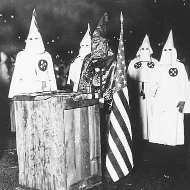 Banjar: Ku klux klan